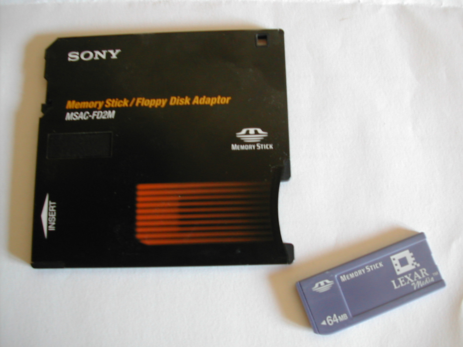 Adaptateur sous format disquette 3,5 pouces pour mémoire flask Memory Stick pour appareil photographique numérique Sony Mavica